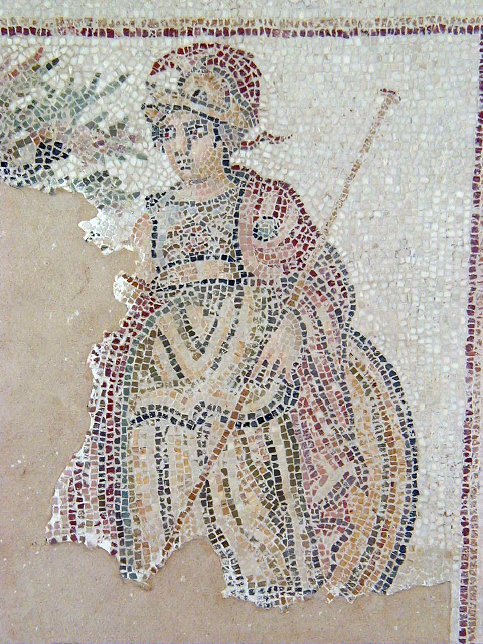 mosaique musée de Carthage, représentation de Rome